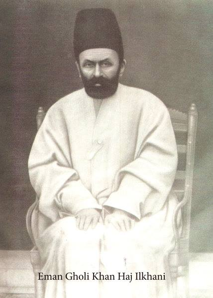 The great ilkhan of bakhtiari